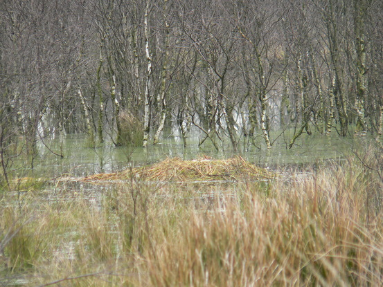 Kranichnest mit Jungvögel im Königsmoor (Teil des NSG „Hahnenknooper Moore“) im Landkreis Cuxhaven, Niedersachsen.